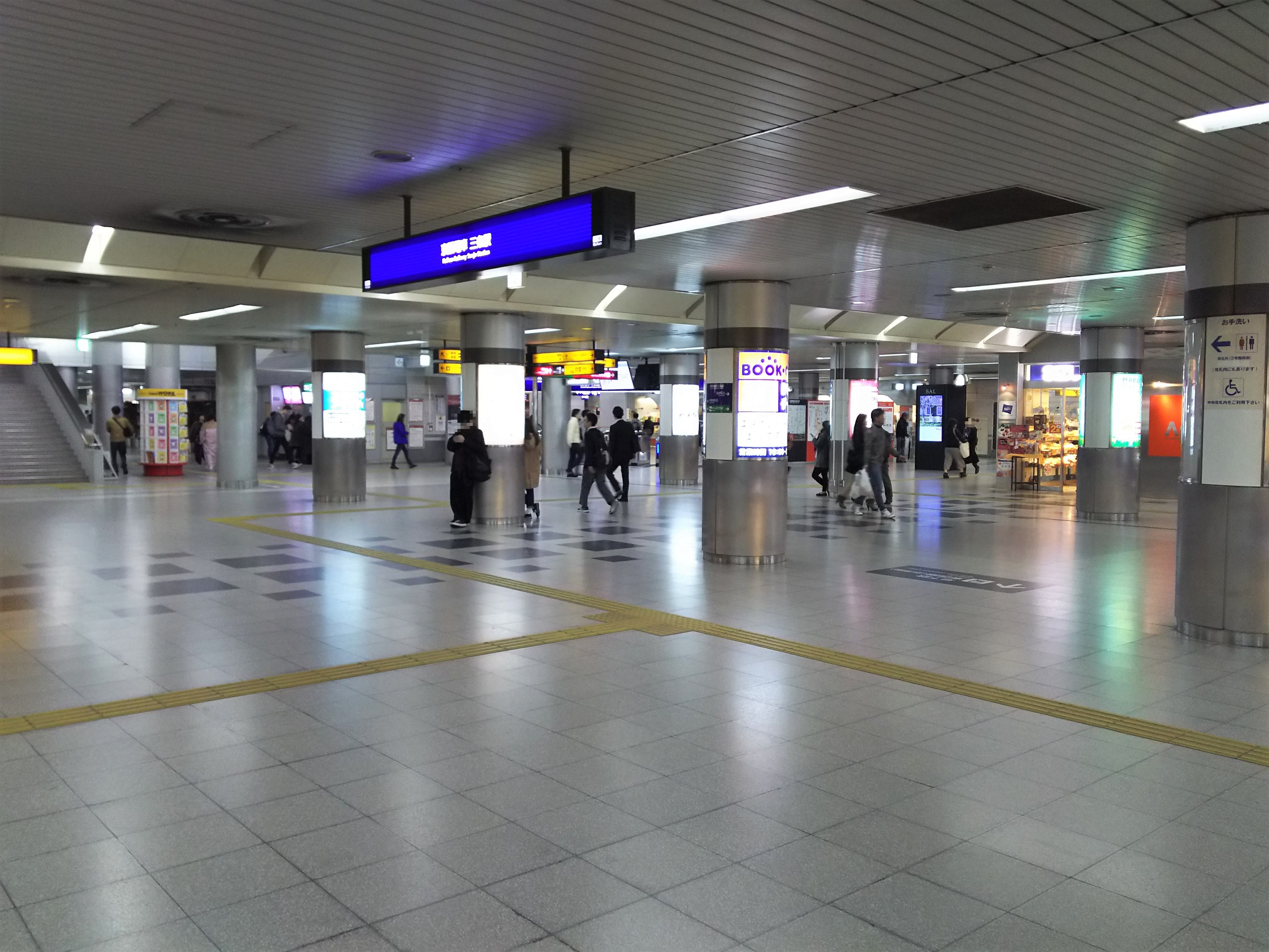 京阪本線三条駅コンコース（京都市東山区）